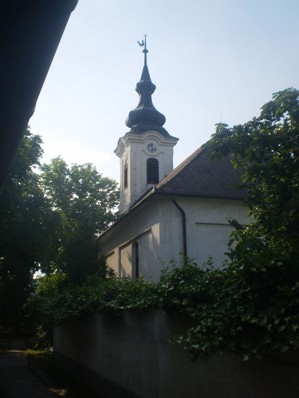 Szigetmonostor református templom (1771)